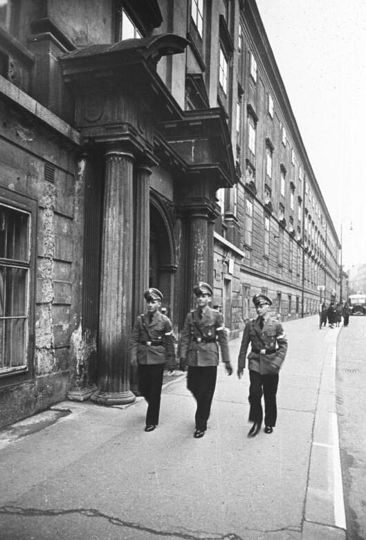 Nationalpolitsche Erziehungsanstalt In den alten Mauern der historischen Erziehungsanstalt Wiens, dem "Theresianum" zog der junge Geist der neuen deutschen nationalpolitischen Erziehung ein und in dem neuen Wien-Theresianum konnte in diesem Jahre der Gründungstag der ostmärkischen nationalpolitischen Erziehungsanstalt feierlich begangen werden.... Jungmannen der Anstalt des Wien-Theresianums verlassen am Sonnabend nachmittag nach dem Dienst in ihrer schmucken Uniform das historische Haus.